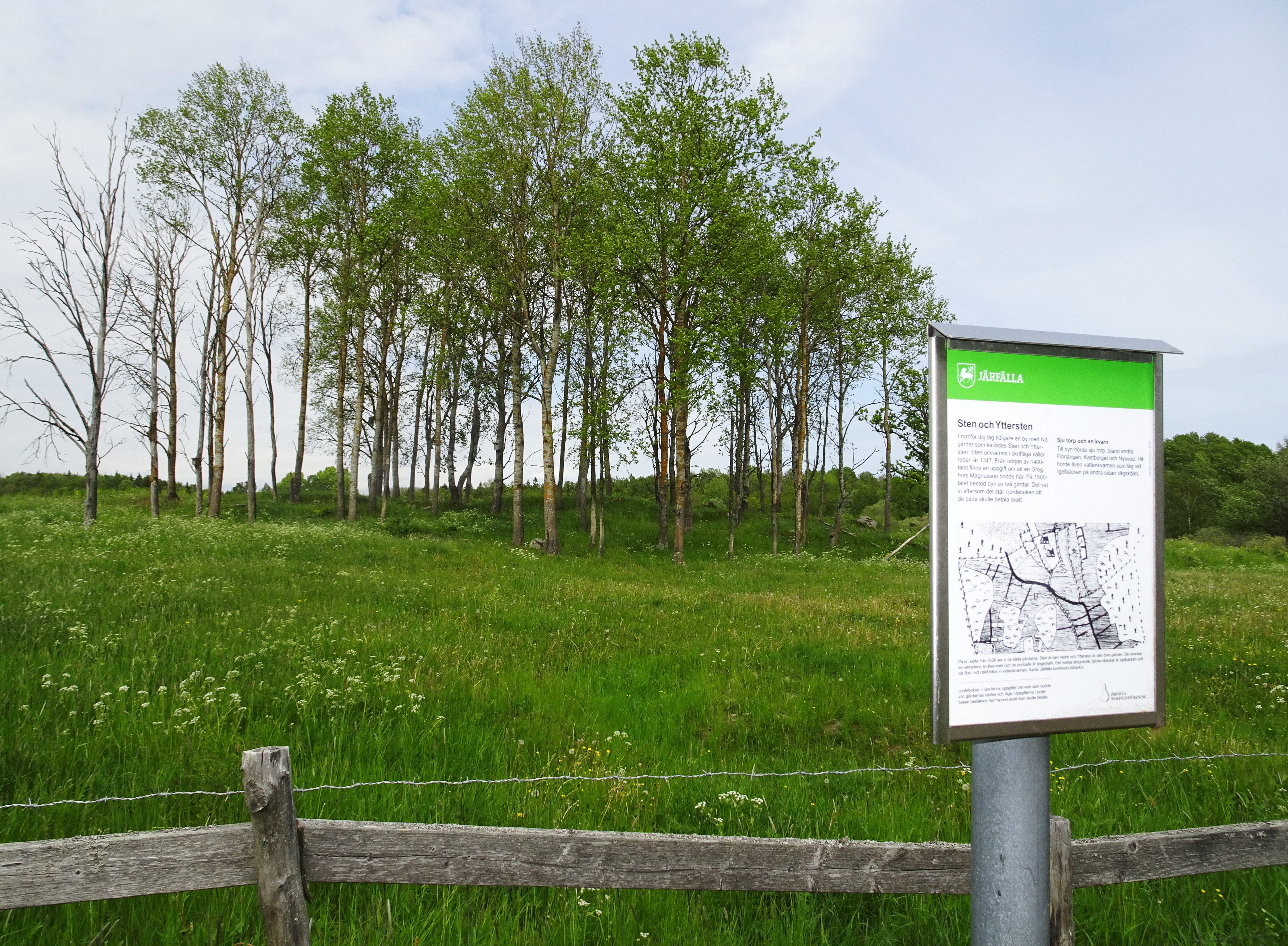 Info-tavla vid tomtplatsen för Sten och Yttersten (ungefär vid dungen)